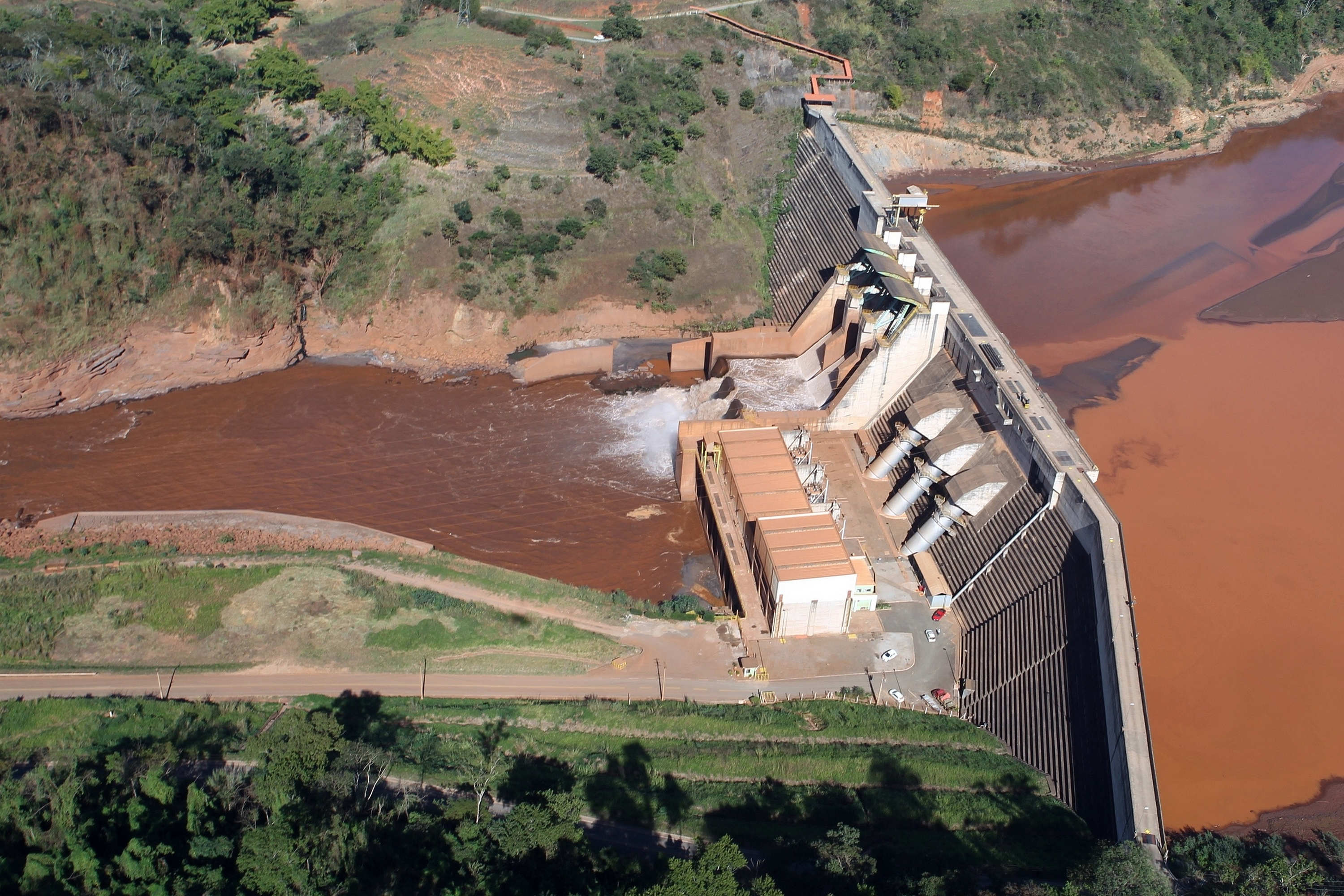 Reservatório da Usina Hidrelétrica Risoleta Neves (Candonga) atingido pelo rompimento da barragem de rejeitos da mineradora Samarco, em Santa Cruz do Escalvado, Minas Gerais. Foto: Felipe Werneck - Ascom/Ibama